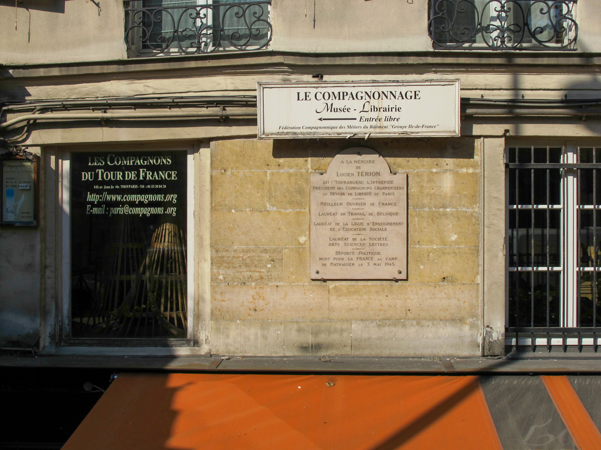 Musée-librairie du compagnonnage, Paris